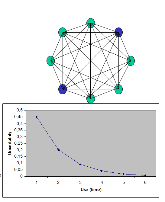 Монгол: 5